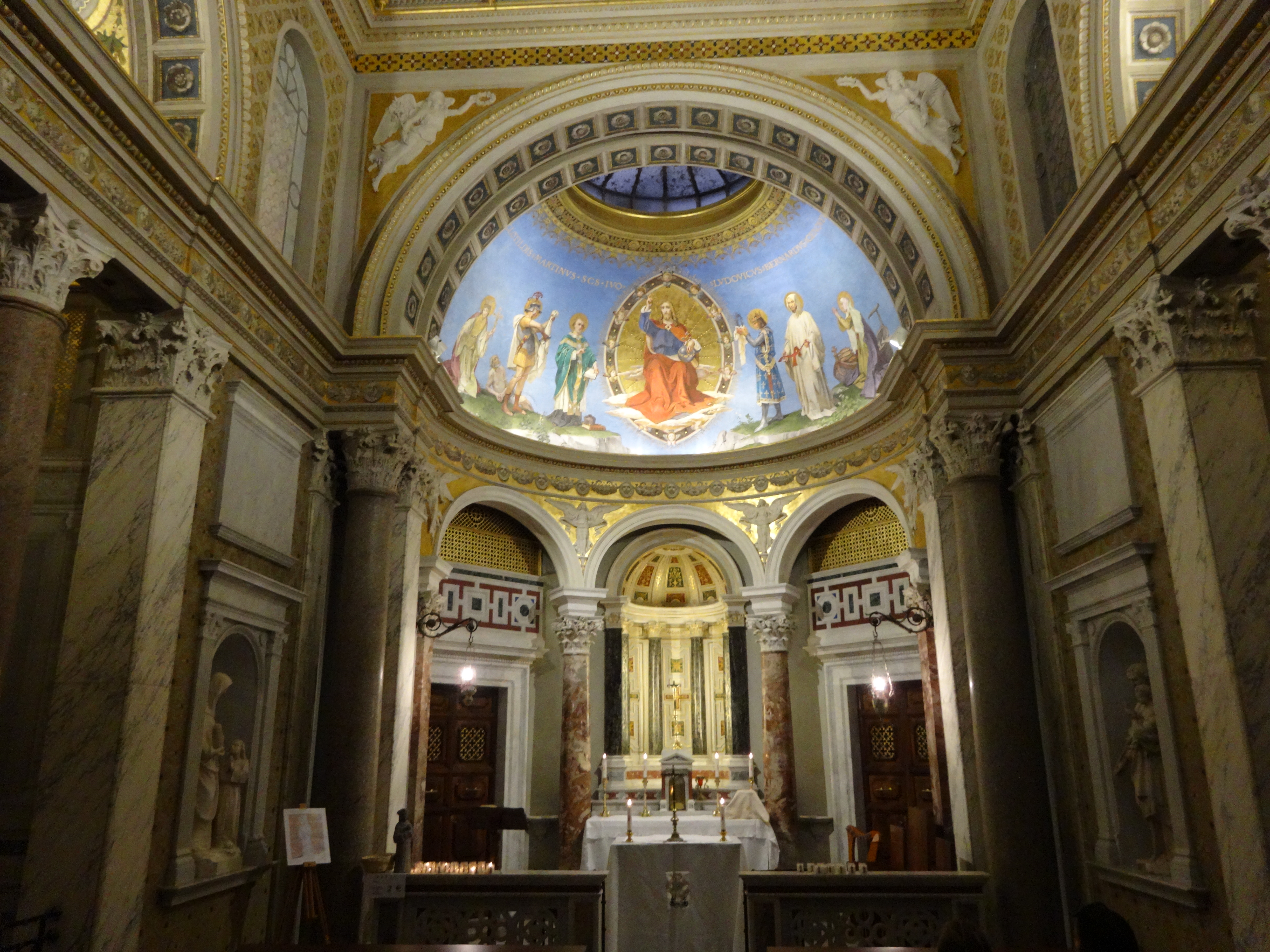 Intérieur de l'église Saint-Yves-des-Bretons (Sant'Ivo dei Bretoni), église nationale des Bretons à Rome